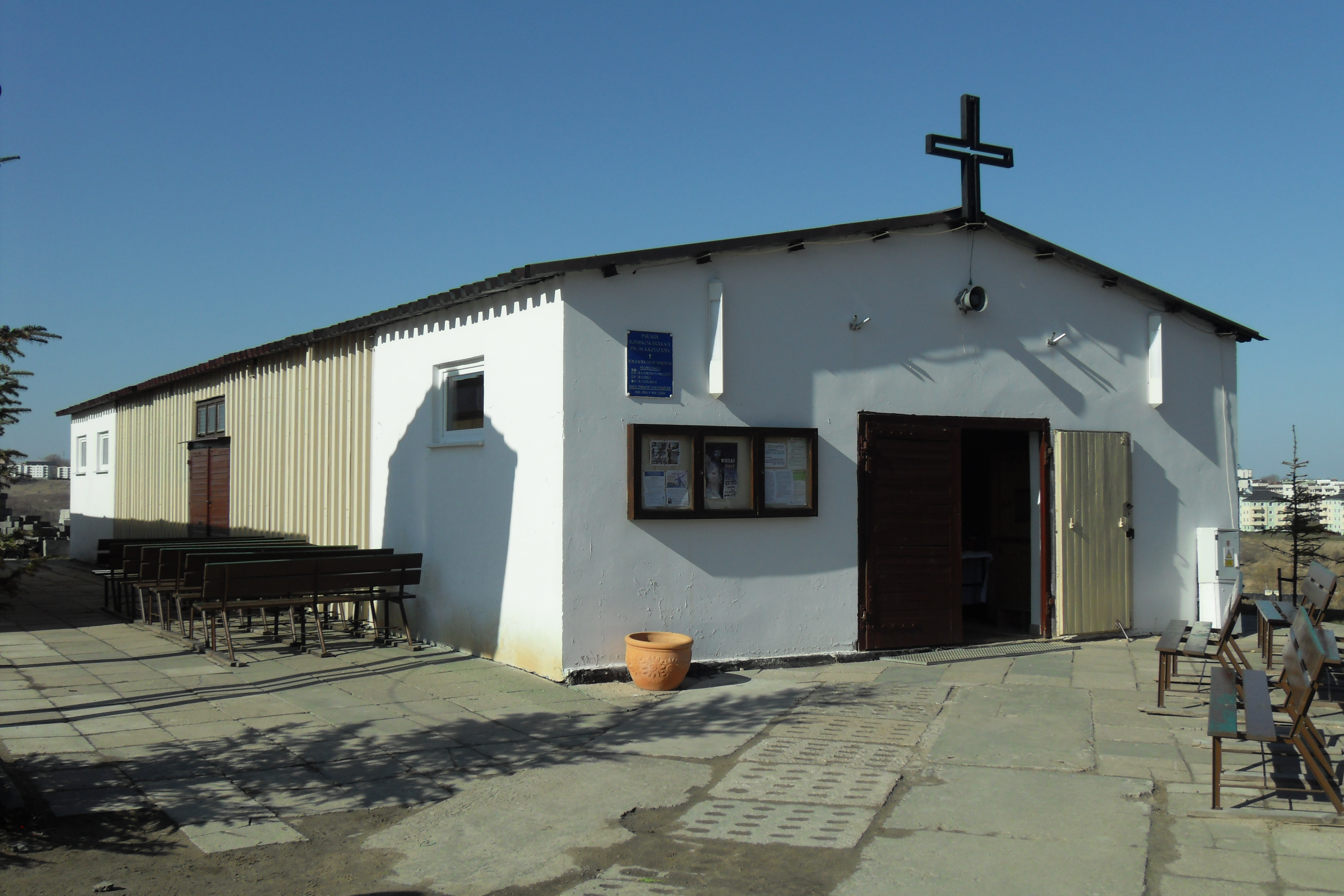 Gdańsk Zakoniczyn, osiedle Świętokrzyskie, ul. Jaworzniaków 10 - kaplica św. Krzysztofa.